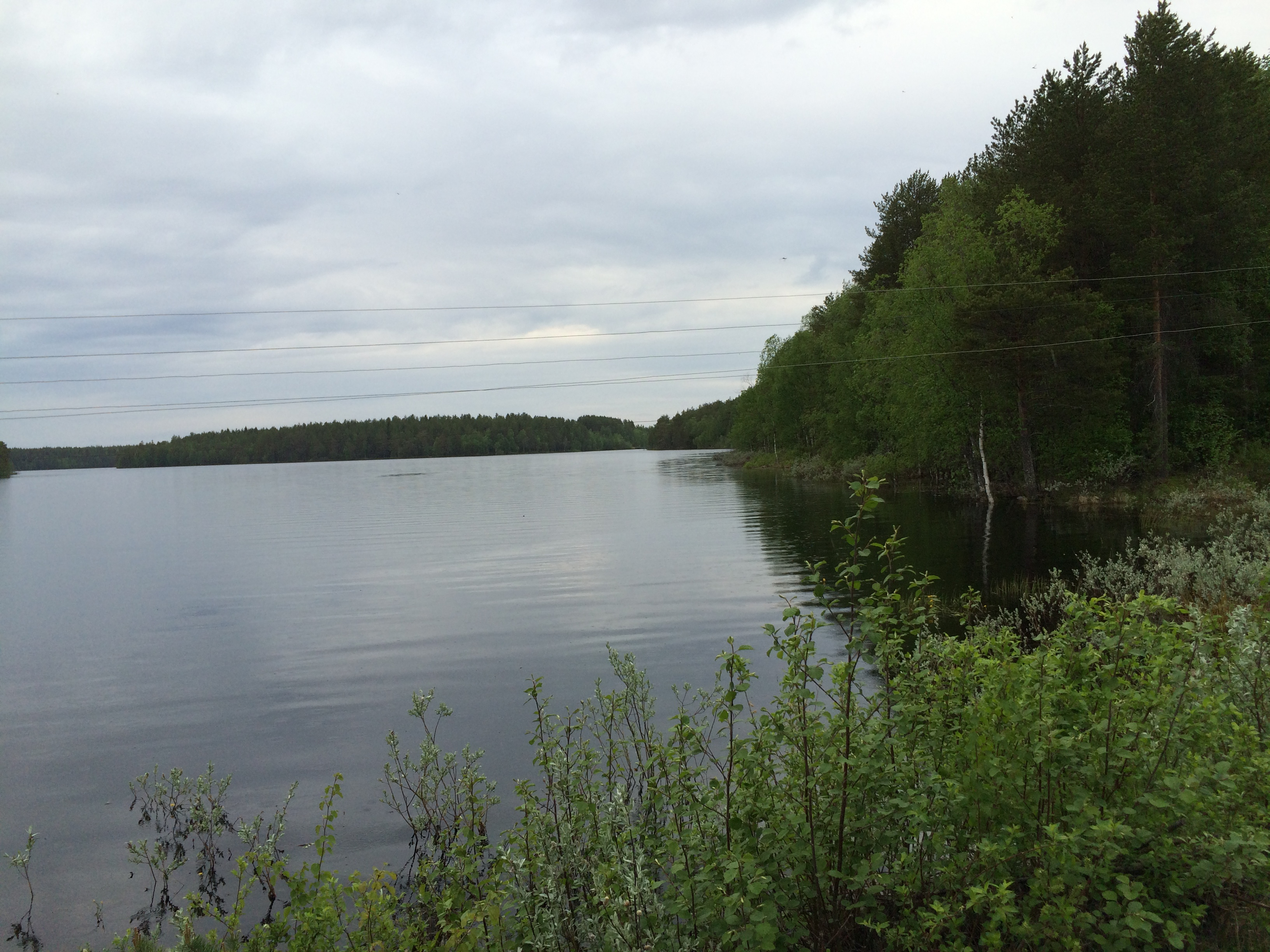 Талвизлакши